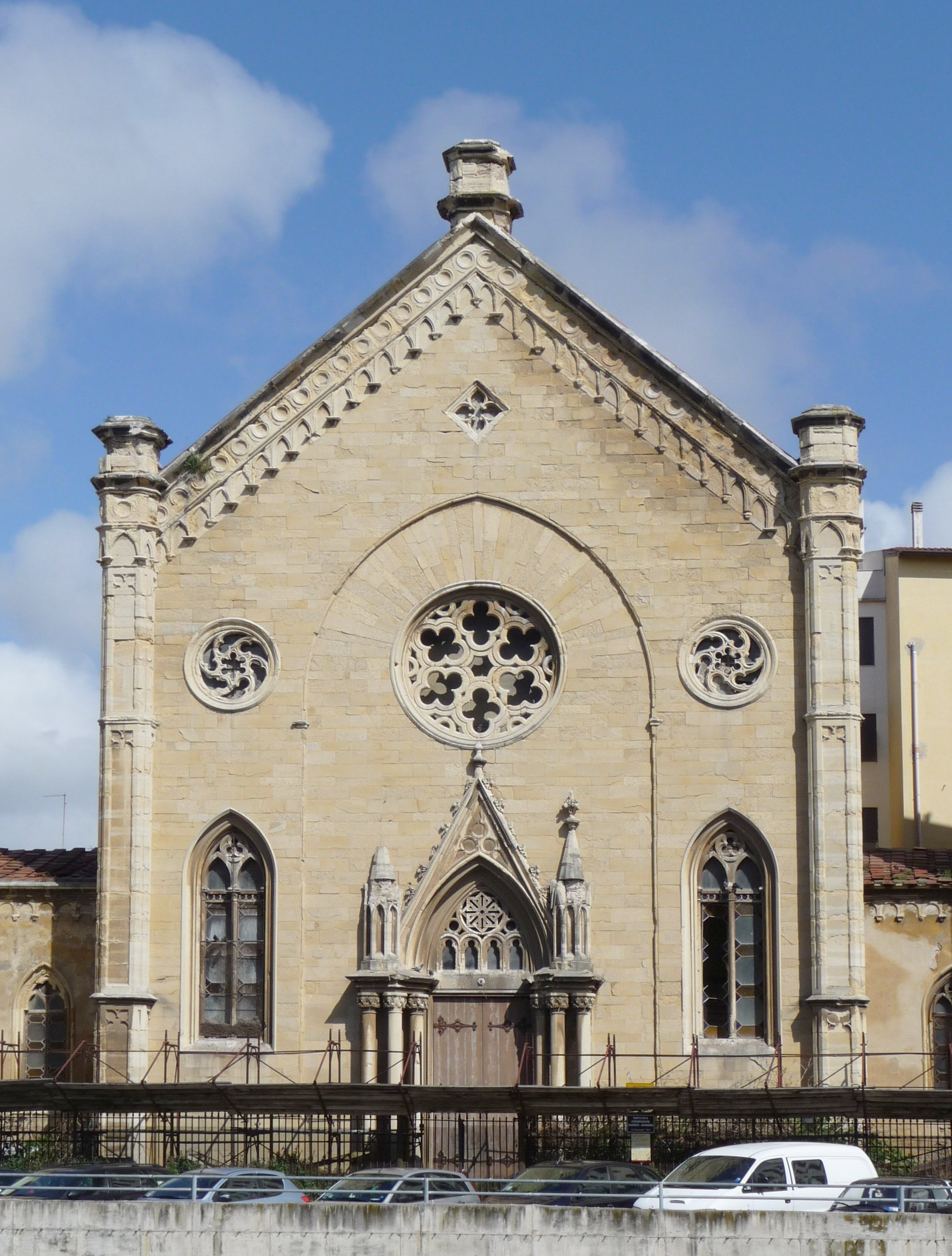 Chiesa della Congregazione Olandese Alemanna (1862-1864), Livorno